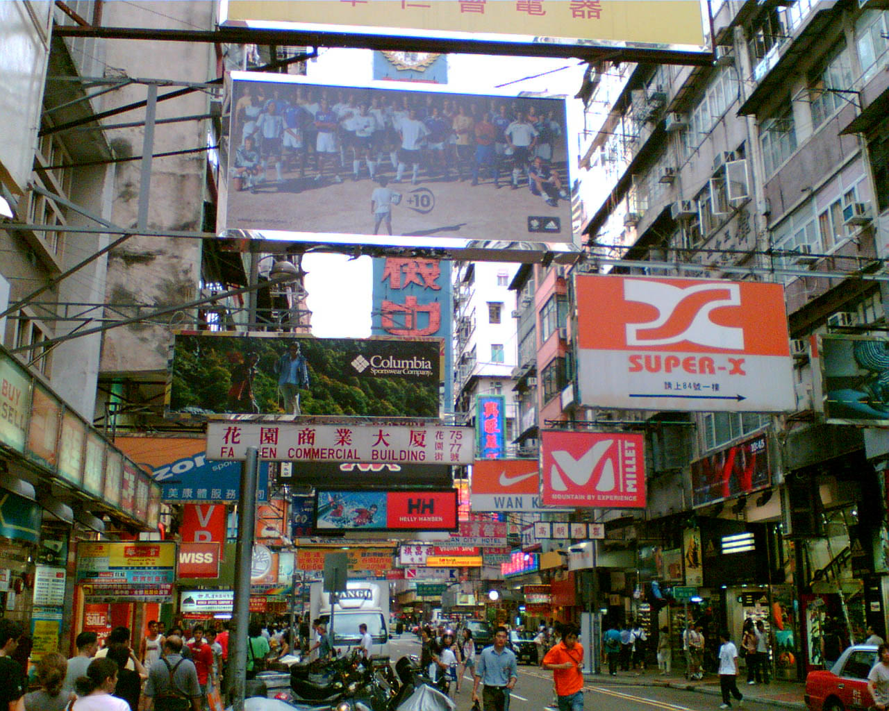 花園街運動用品店舖林立